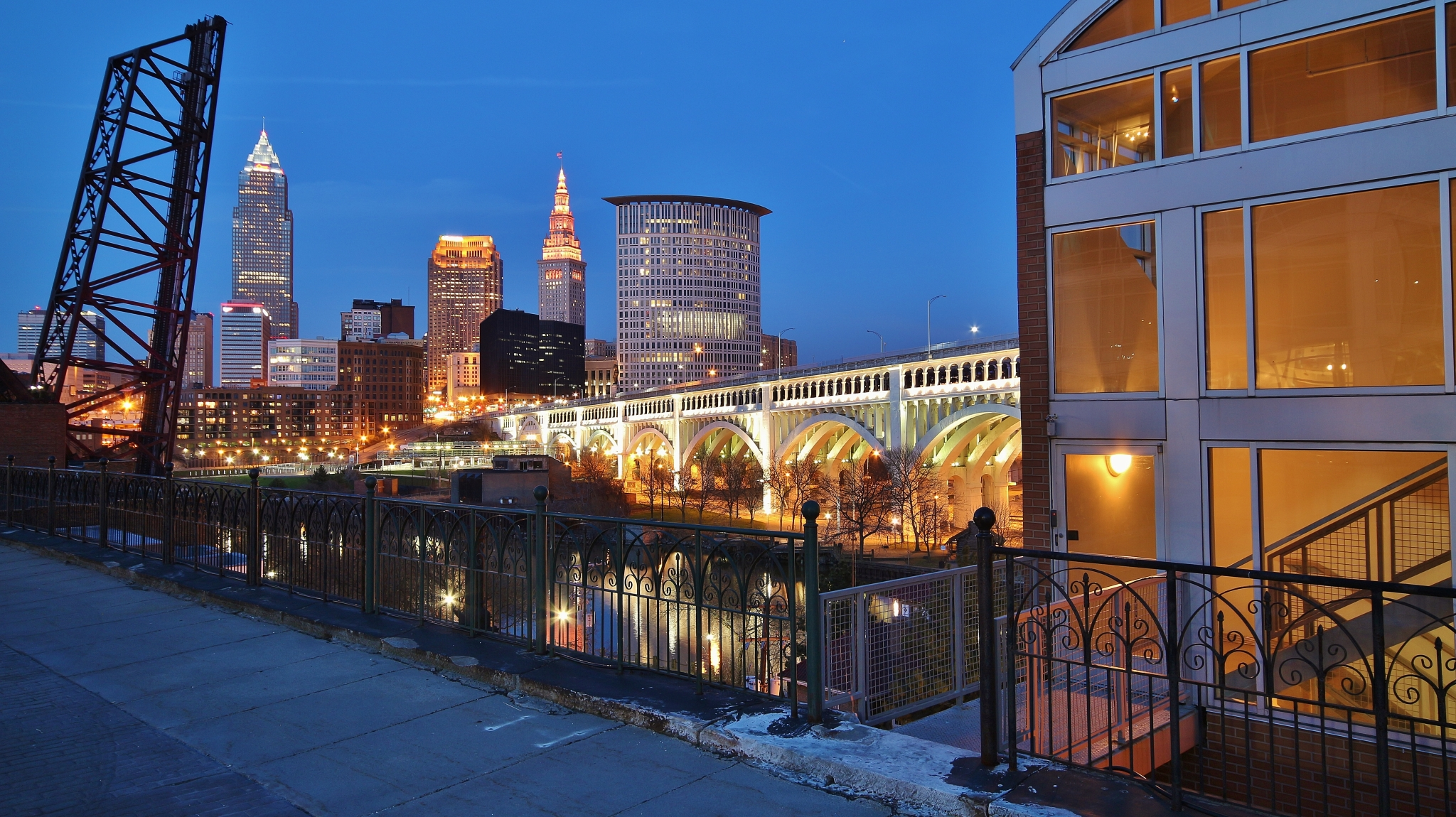 April 2014